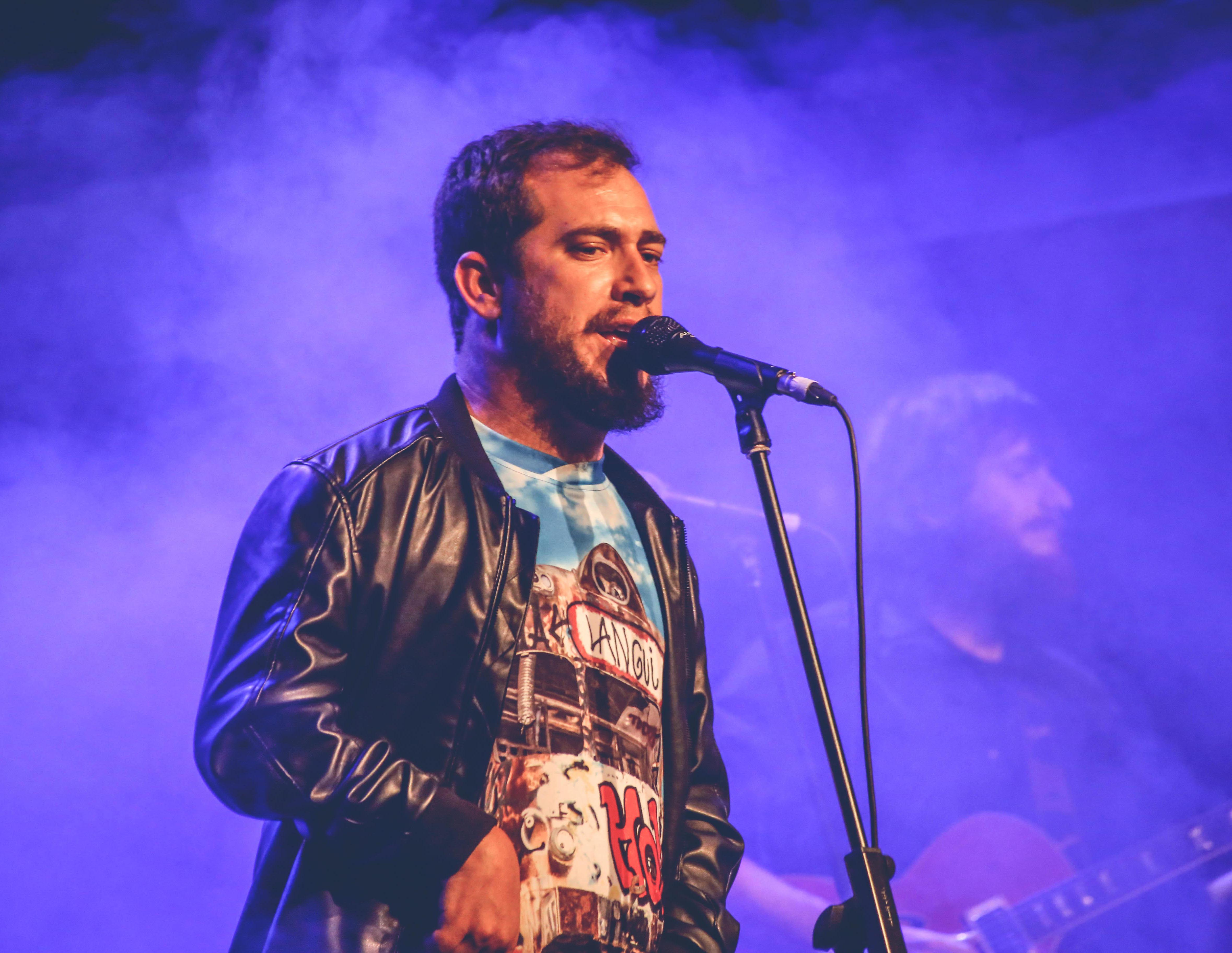 El Langui en concierto durante su gira 2016